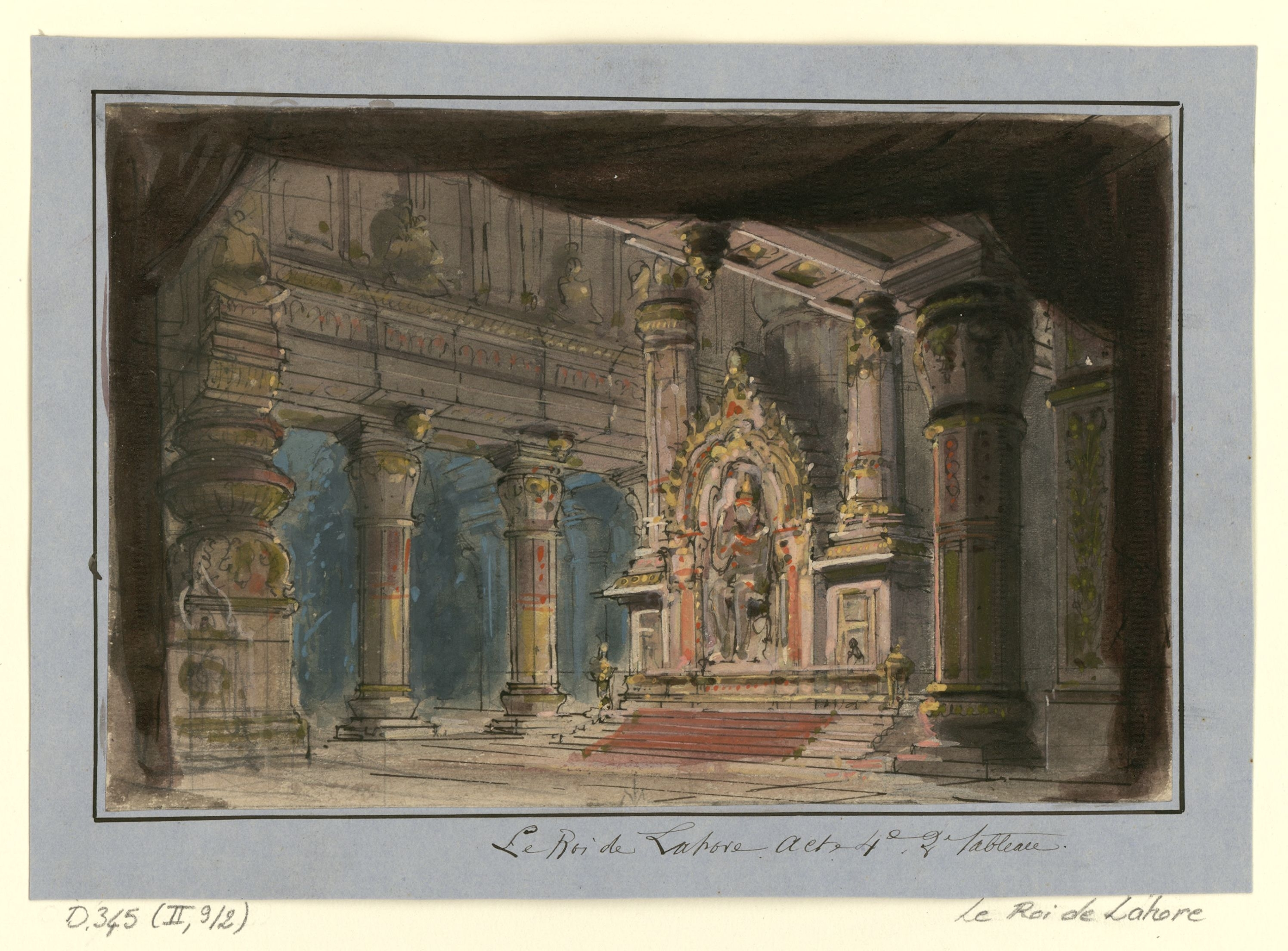 [Le roi de Lahore : esquisse de décor de l'acte V, tableau 1 : Intérieur du sanctuaire d'Indra / Philippe Chaperon]